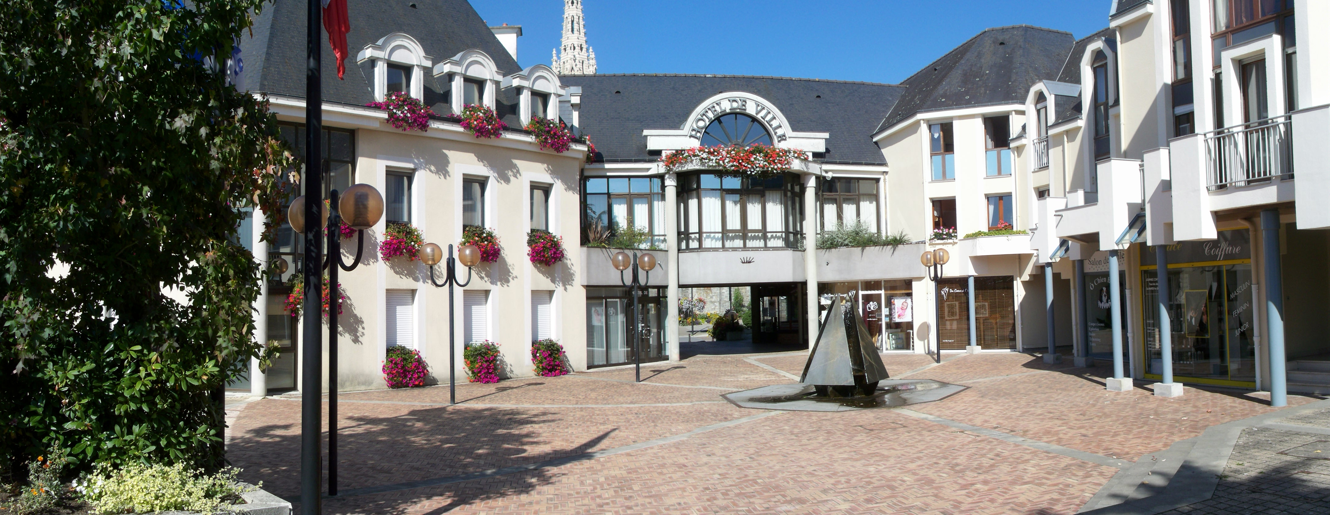 L'Hôtel de ville de Noyal-sur-Vilaine.